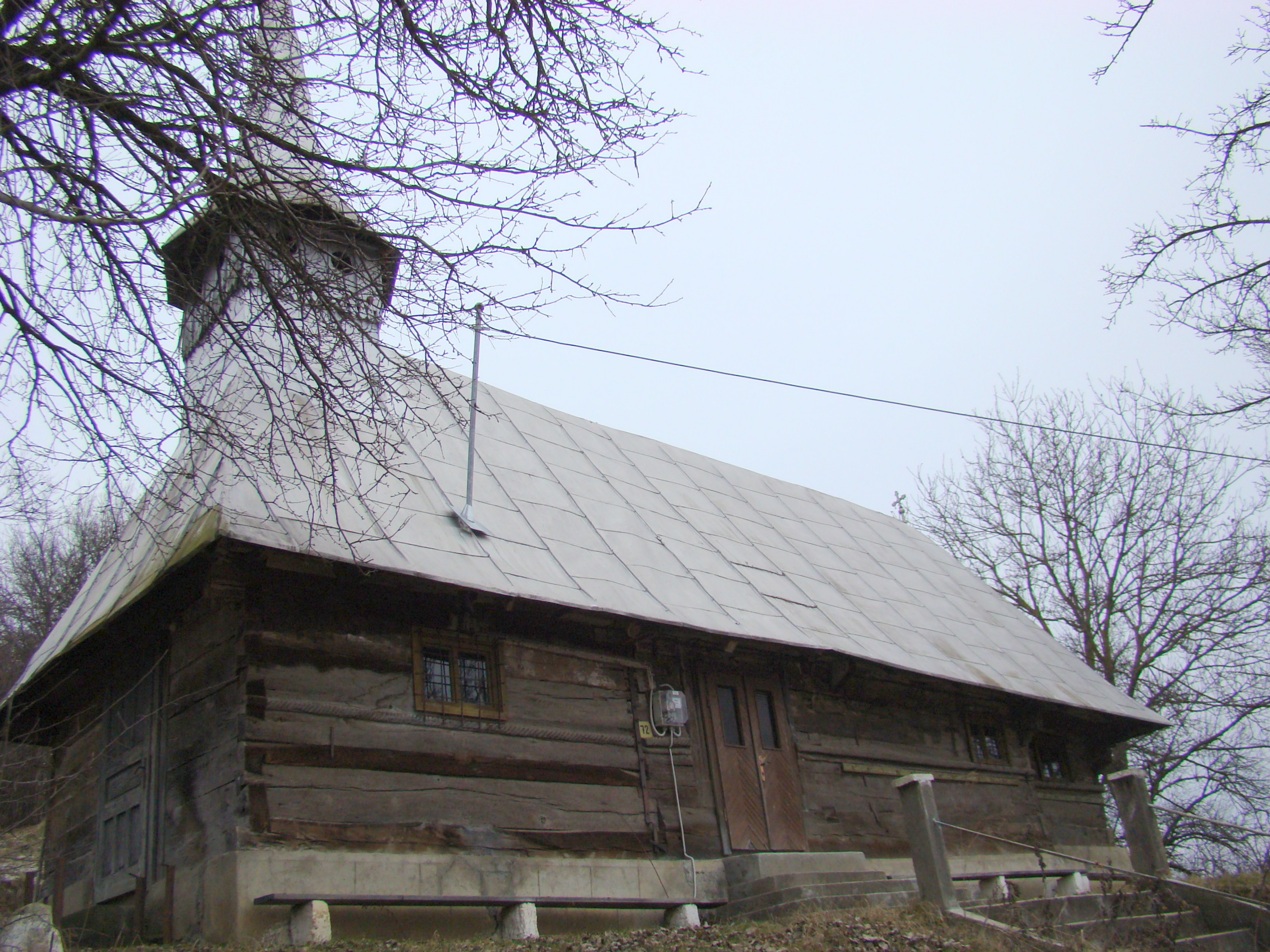 Biserica de lemn din Chichişa